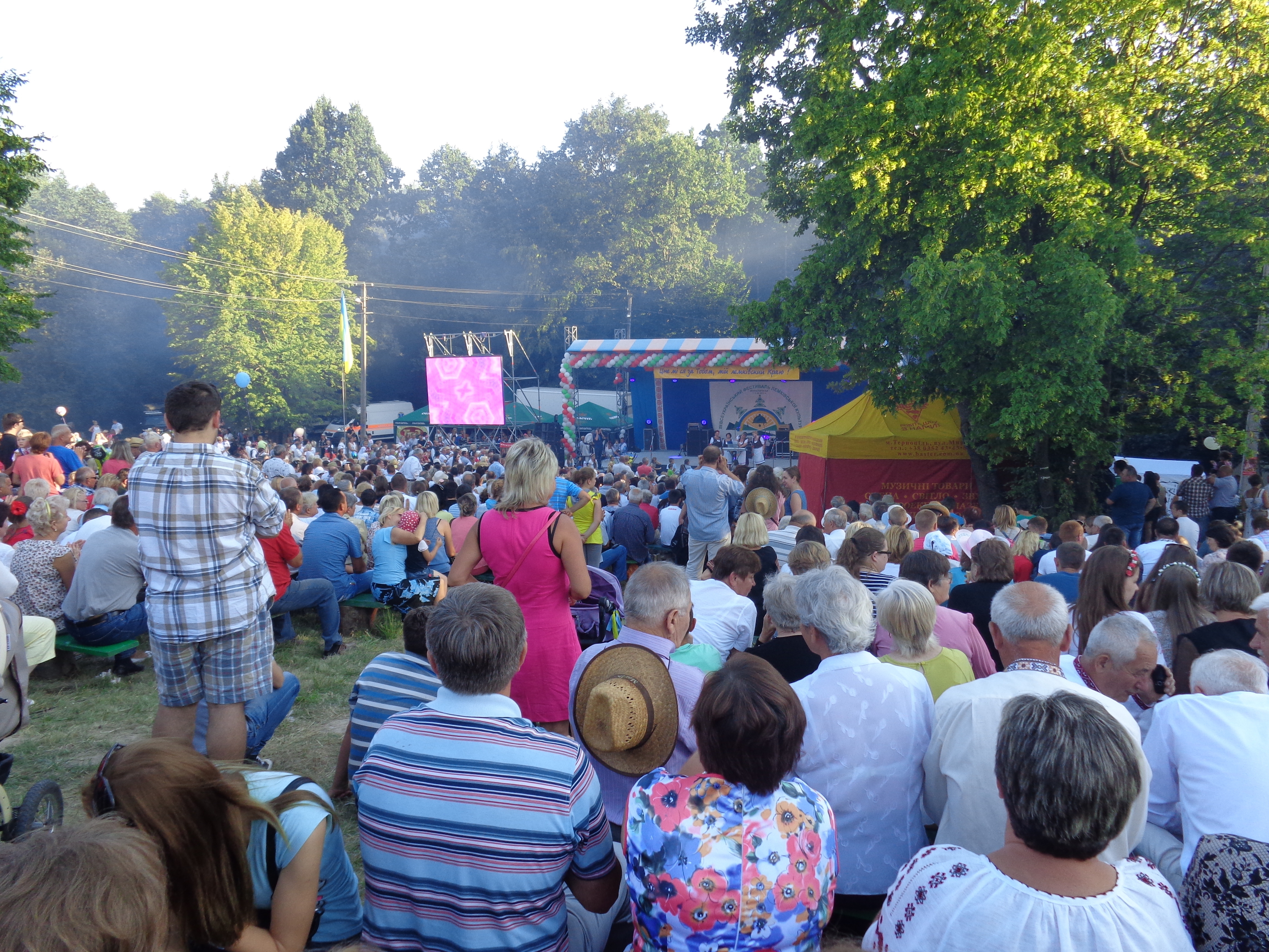 Фестиваль лемківської культури "Дзвони Лемківщини".